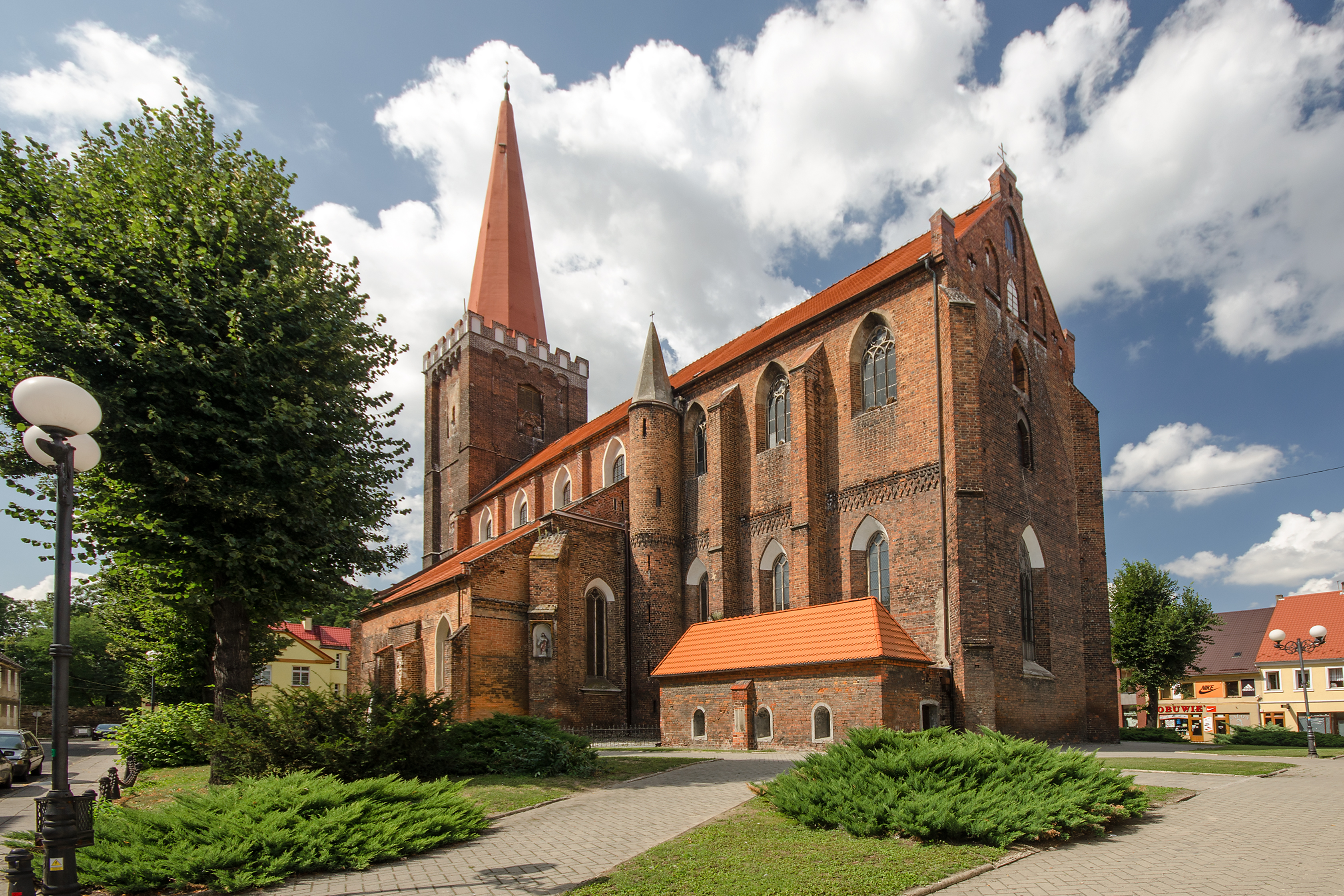 Grodków, kościół par. p.w. św. Michała, kon. XII, XV, XVII